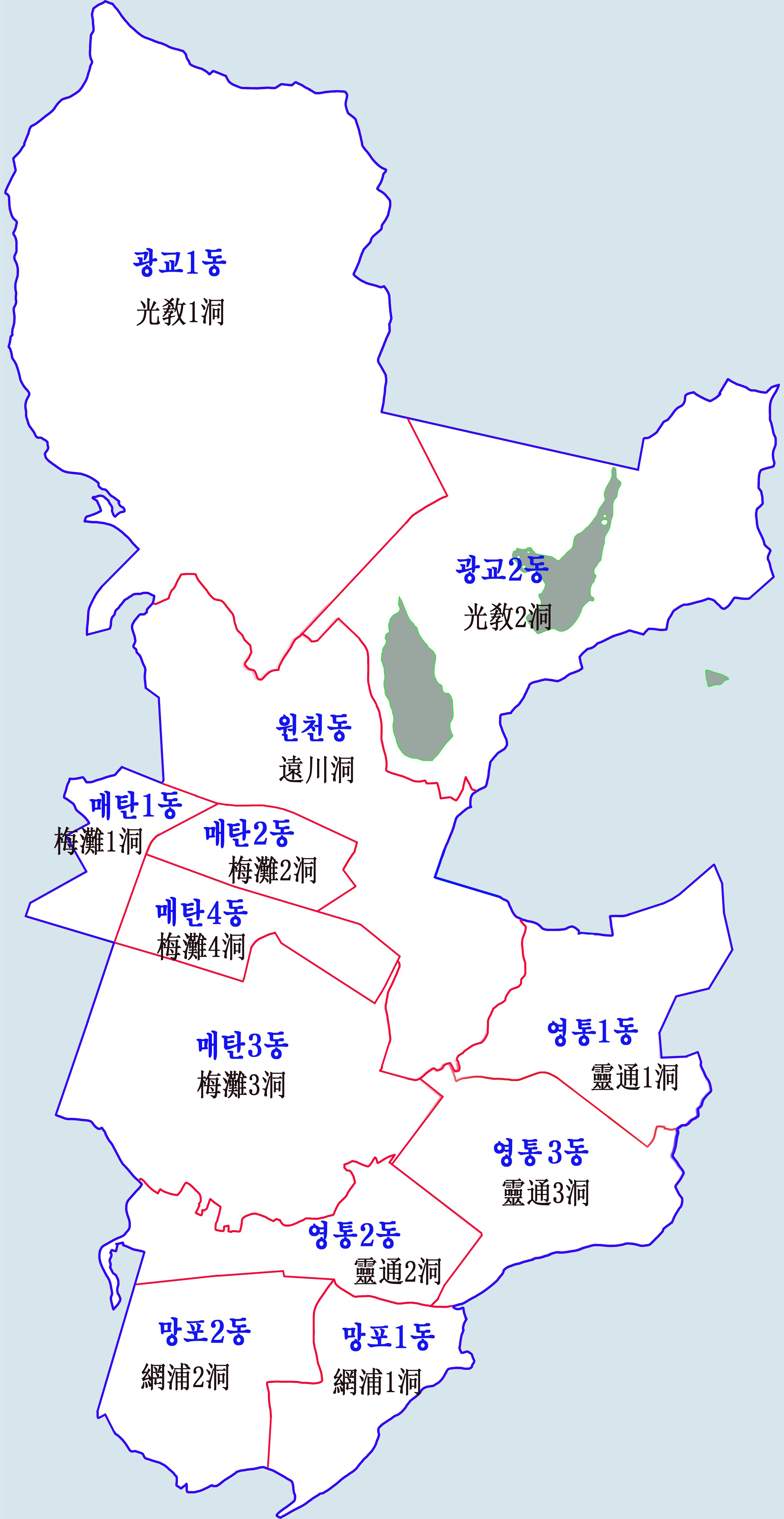 수원시 영통구 행정구역